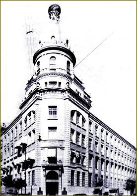 Antigua Editorial Haynes, en Rio de Janeiro y Bogotá - Caballito, Buenos Aires. Editorial que además de muchas revistas de gran difusión, fue la creadora de el diario "El Mundo" de Buenos Aires, desaparecido desde 1967.